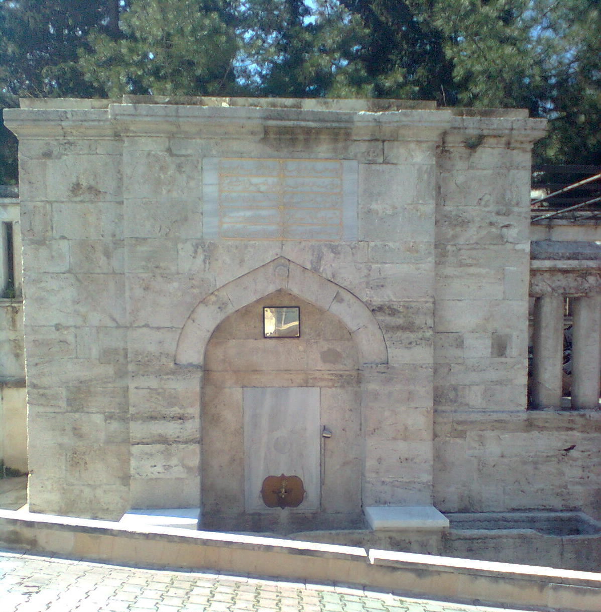 İbn'ül Emin Ahmed Ağa Çeşmesi, İbn'ül Emin Ahmed Ağa tarafından 1721 yılında Üsküdar'da yaptırılmıştır.